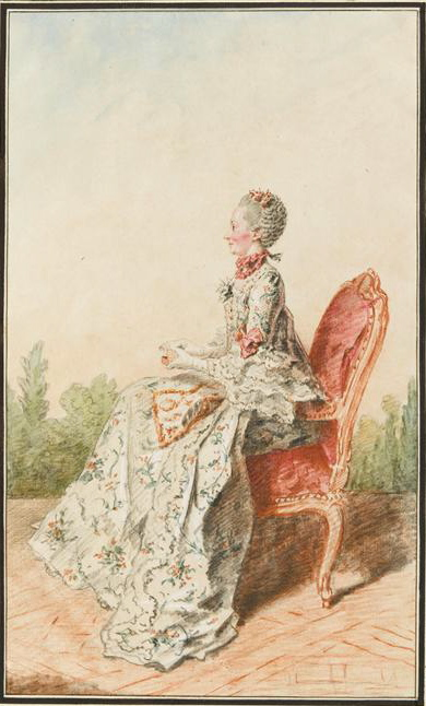 Madame de Villeneuve